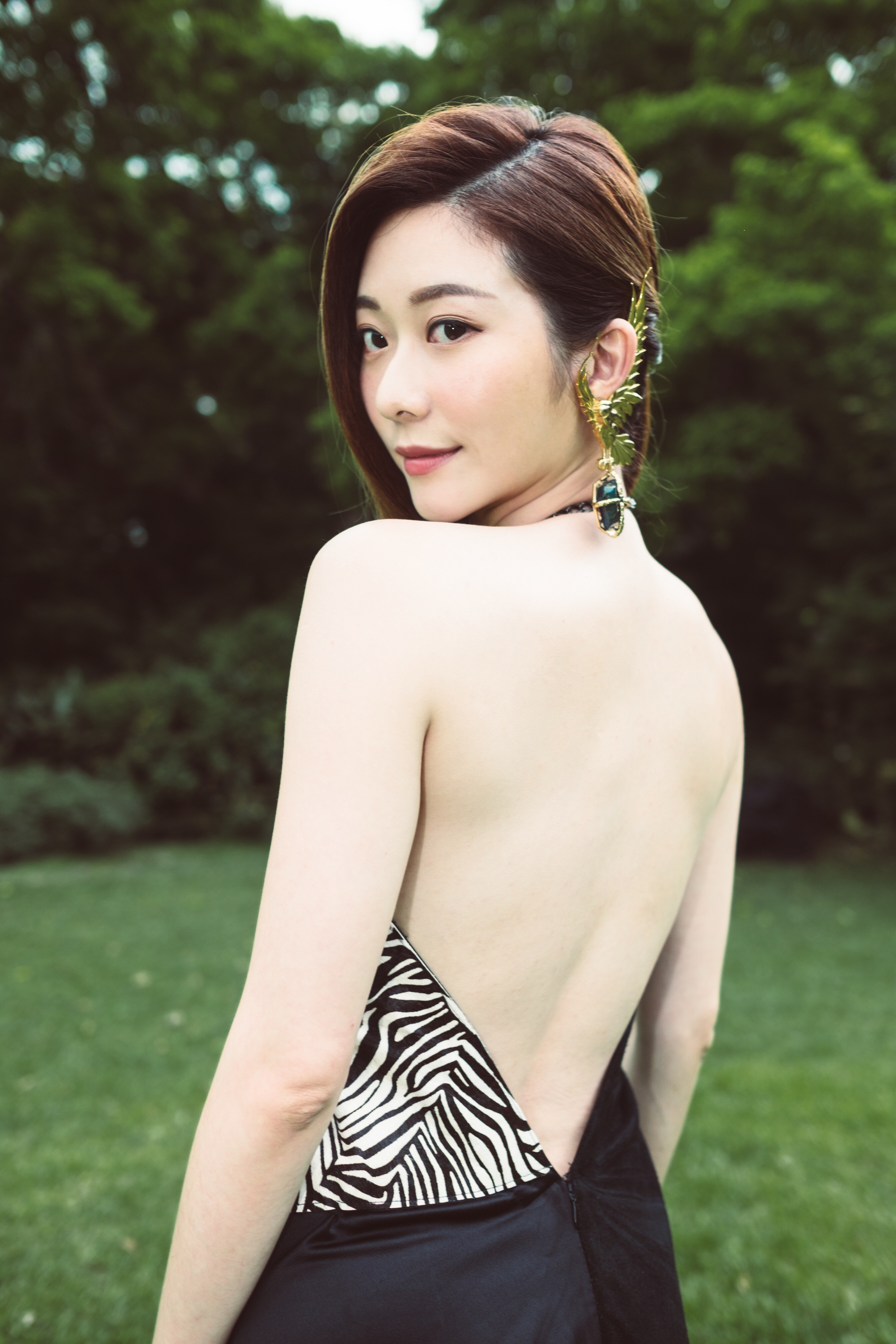 中文（台灣）: 2019年張景嵐參加daniel wong活動